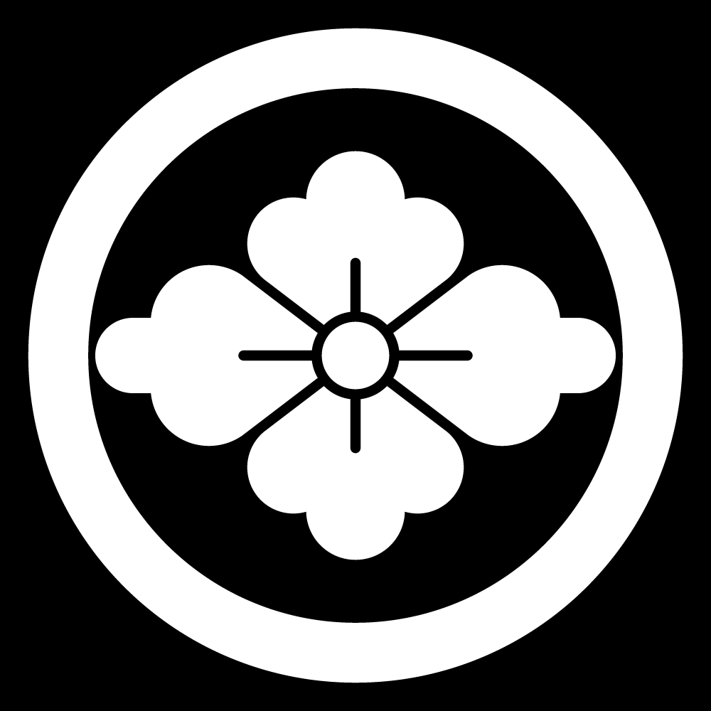 花菱紋の一種「丸に花菱」。元は有職文様だが、甲斐武田氏の一門が家紋として用いたことで有名。